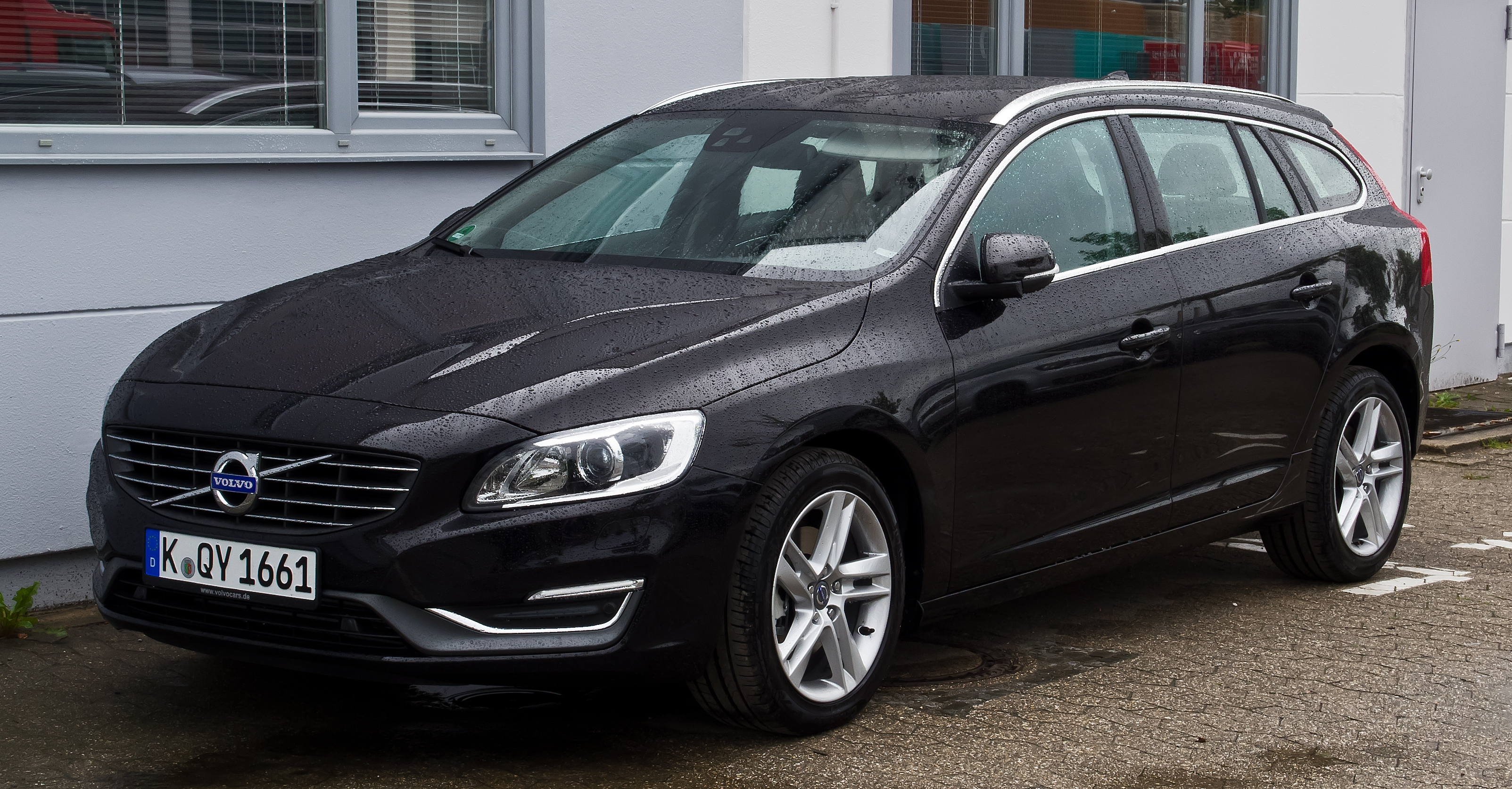 Volvo V60 D4 Summum (Facelift)